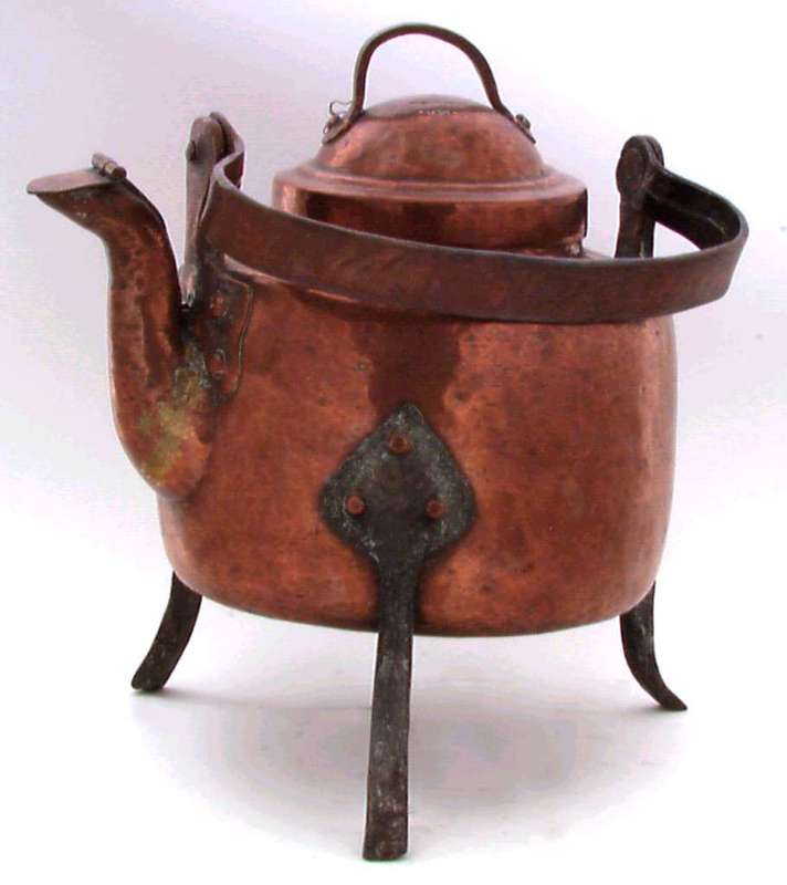 Kaffekjele av kobber med føtter av jern, Kaffekjele, Norsk Folkemuseum, NF.19808-0354